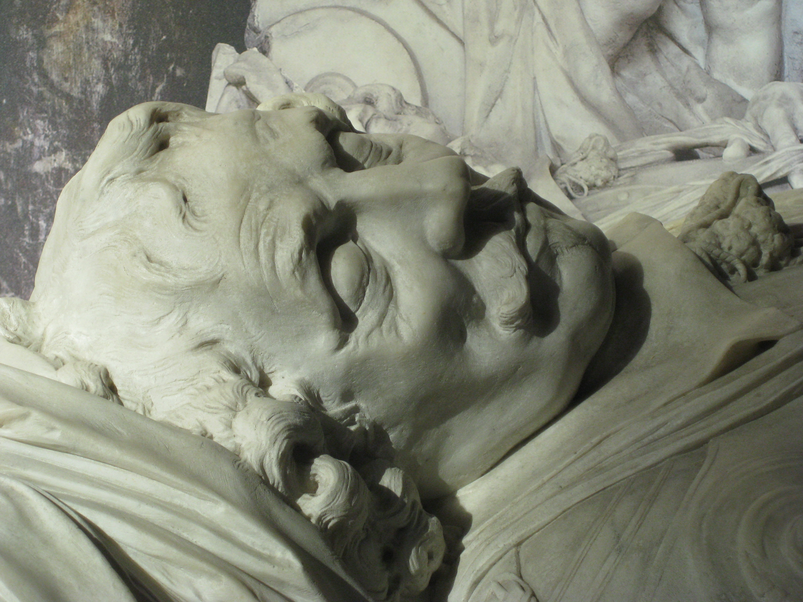 Detail van het beeld van Maarten Harperszoon Tromp in de Oude Kerk in Delft. Kunstenaar Rombout Verhulst